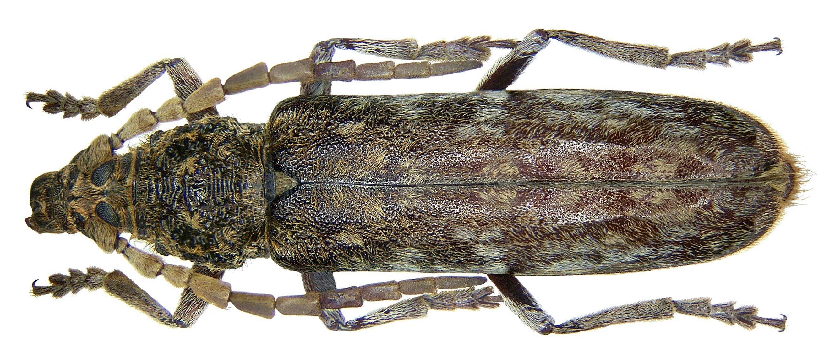 Familie: Cerambycidae Grösse: 35 mm Fundort: Malaysia, Nord-Borneo, Sabah leg. F. bin Eying, 2005; det. A.Weigel Foto: U.Schmidt, 2007